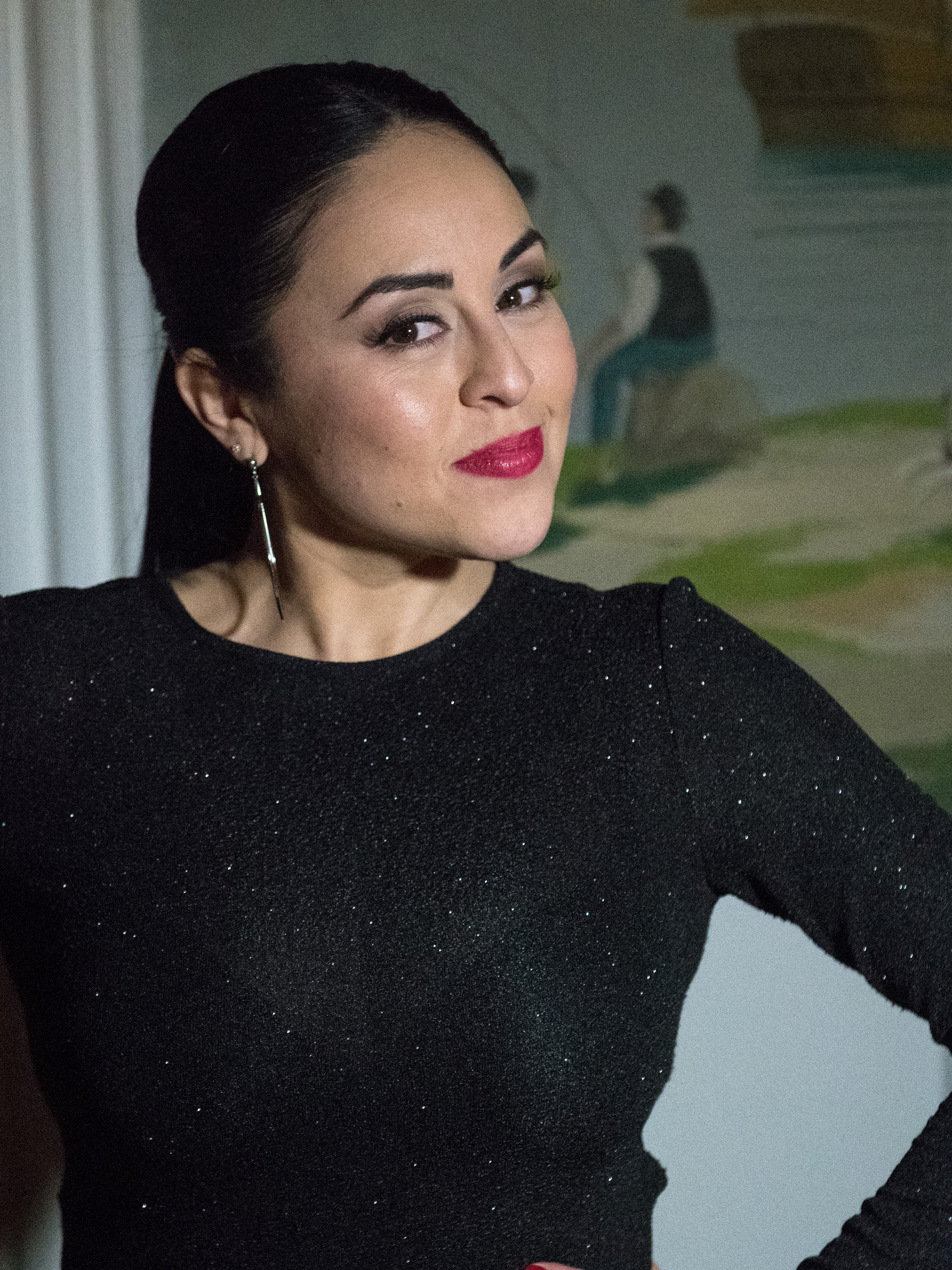 Barbi Escobar under efterfesten av den tredje deltävlingen i Malmö.